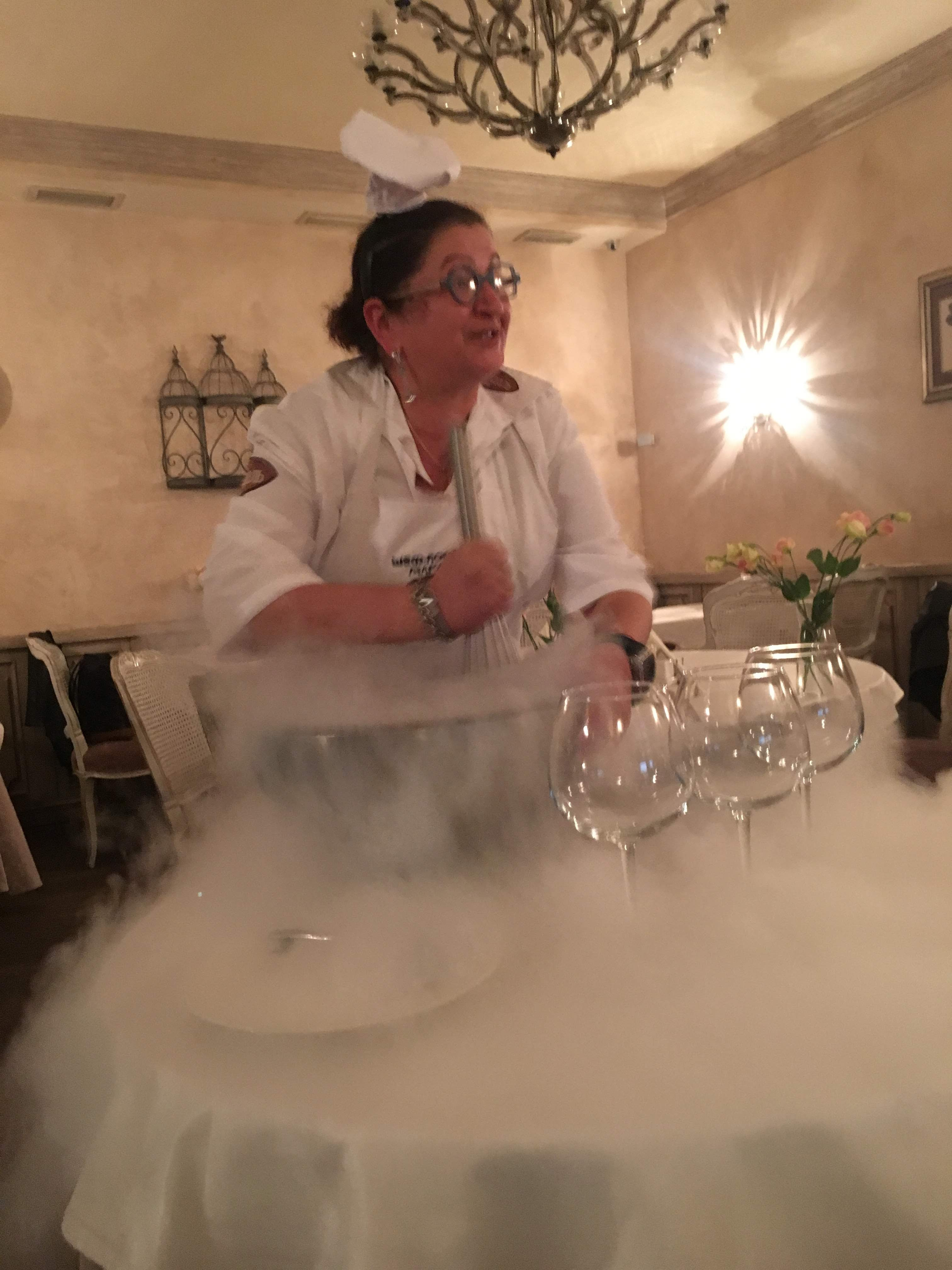 Шеф-повар кафе Миндаль (Санкт-Петербург) за приготовлением сорбета с использованием жидкого азота